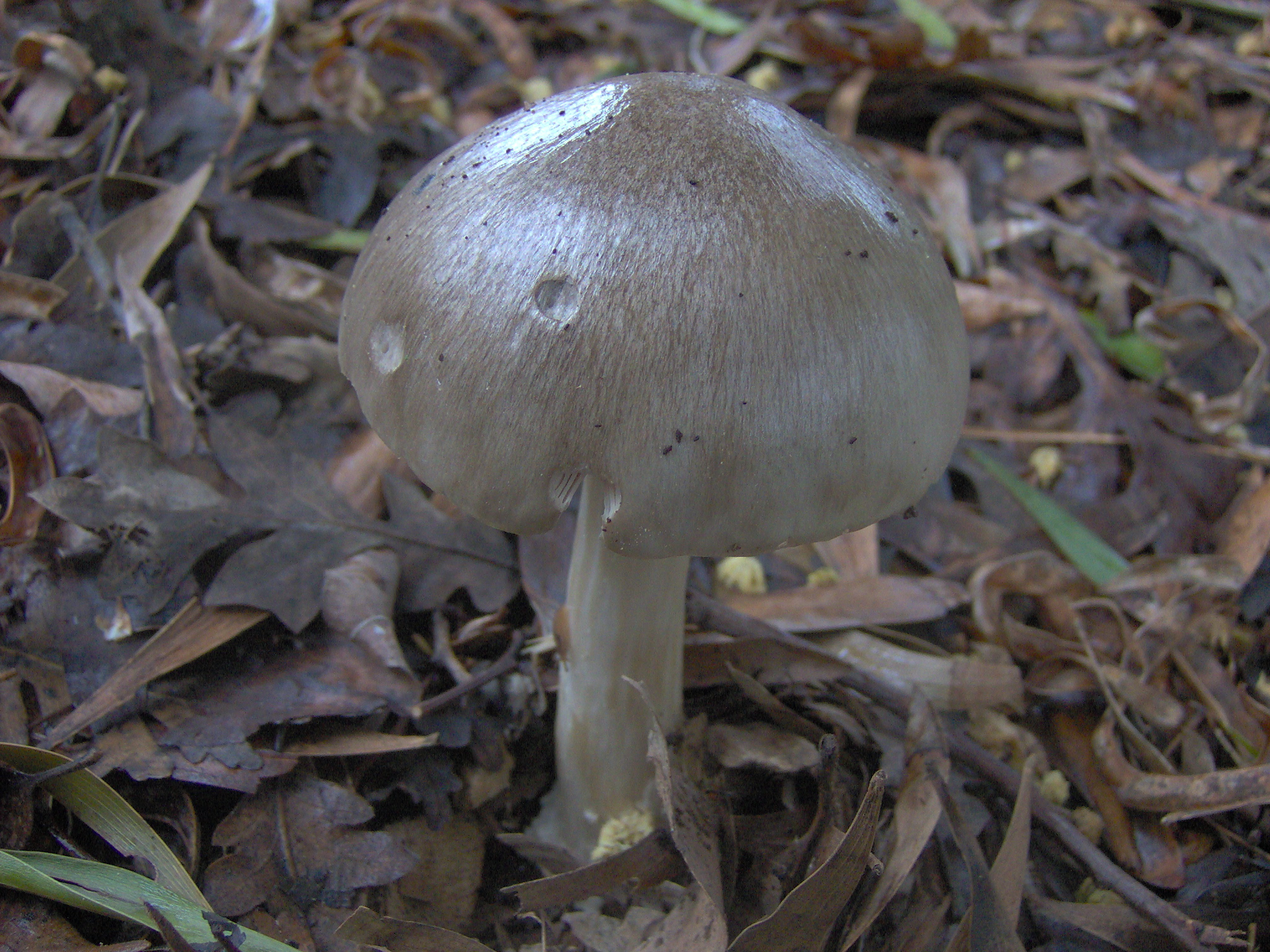 Volvopluteus gloiocephalus (DC.) Vizzini, Contu & Justo